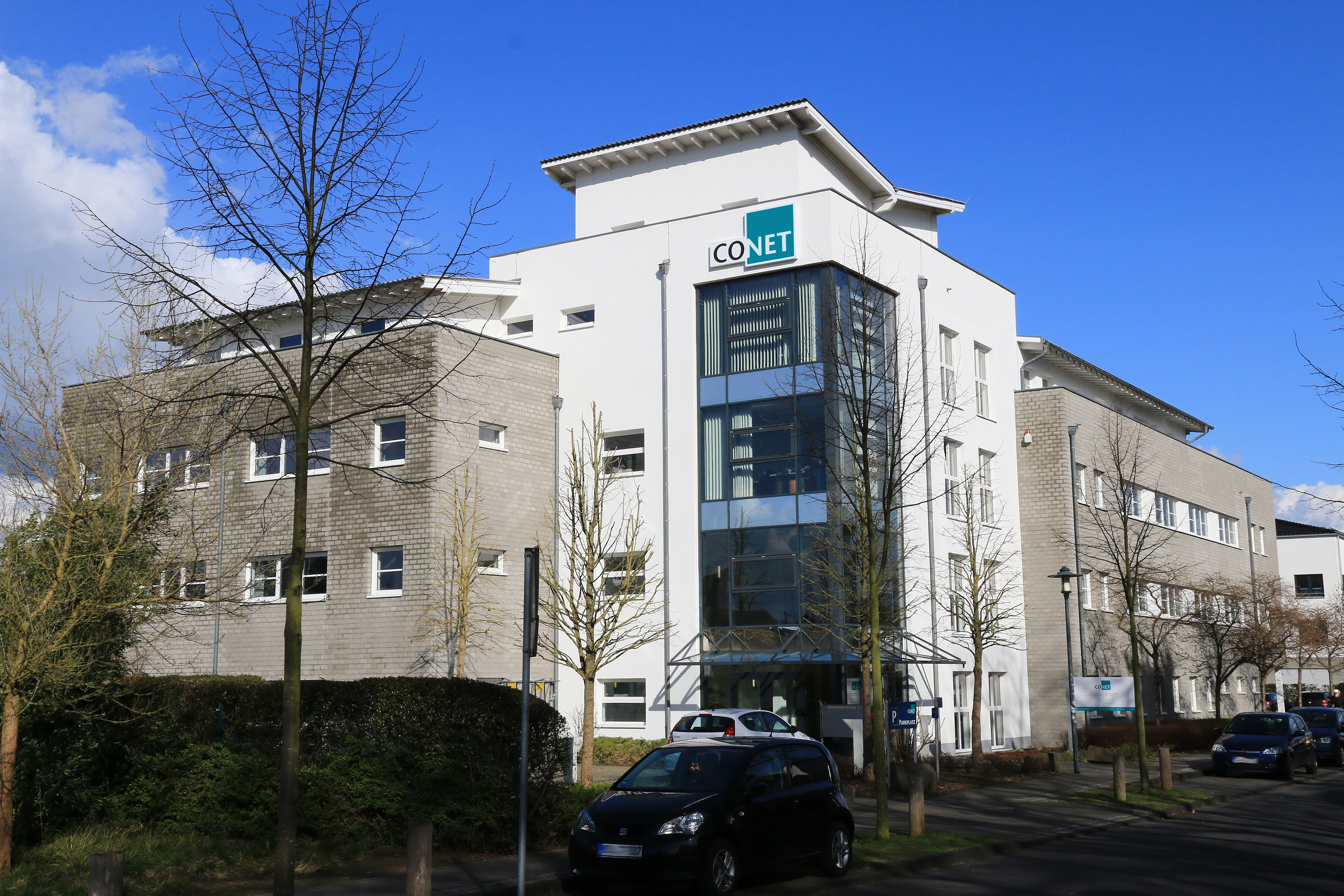 Hauptsitz der Unternehmensgruppe CONET an der Humperdinckstraße 1, 53773 Hennef, Deutschland